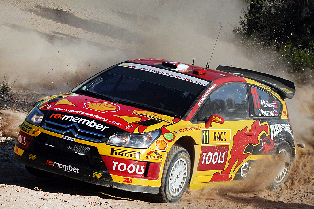 Solberg-Patterson Catalunya2010